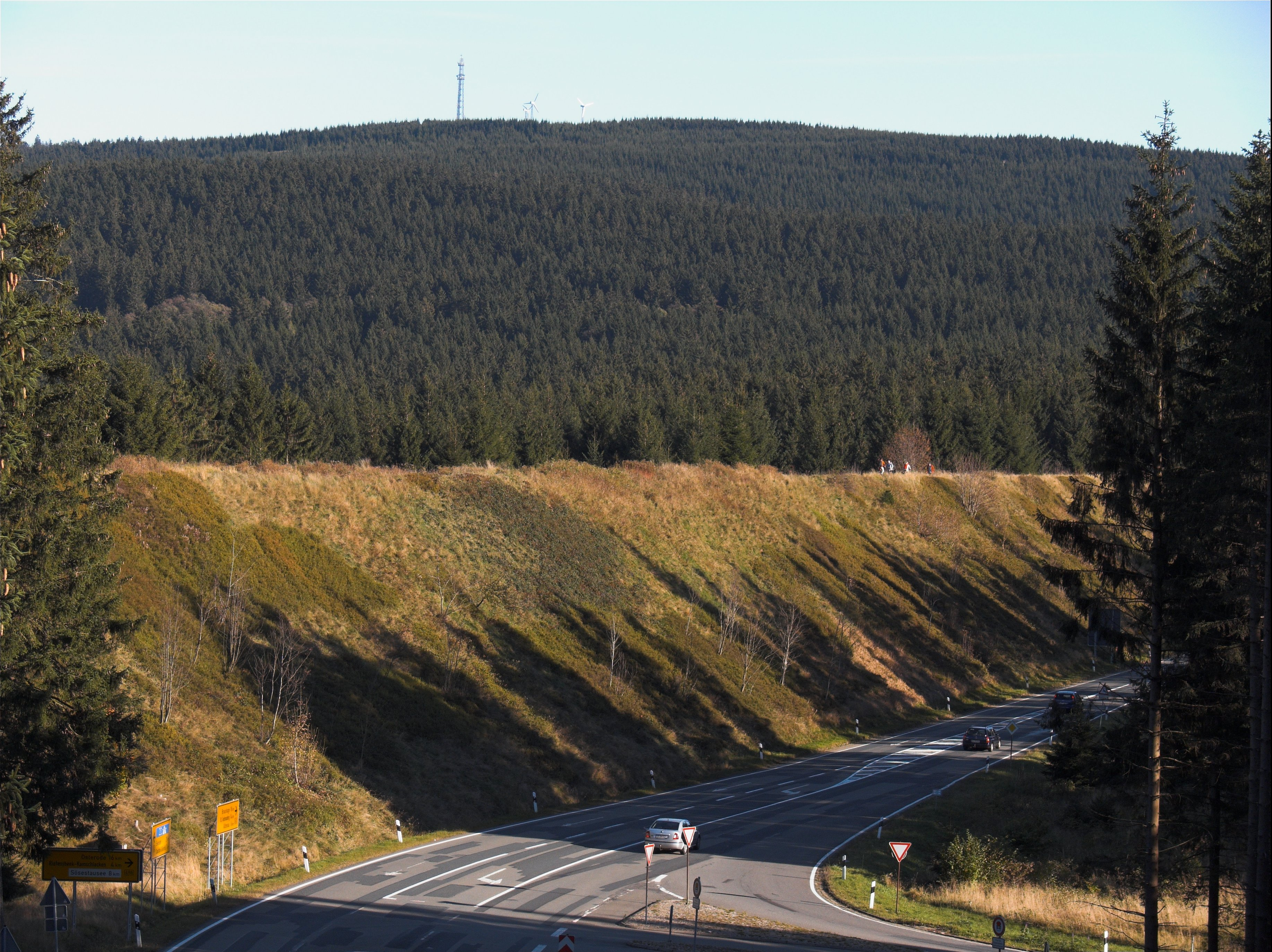 Der Mittelteil des Sperberhaier Damms von der Westseite aufgenommen. Im Vordergrund die Einmündung der B 498 in die B 242.